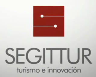 Imagen corporativa de SEGITTUR